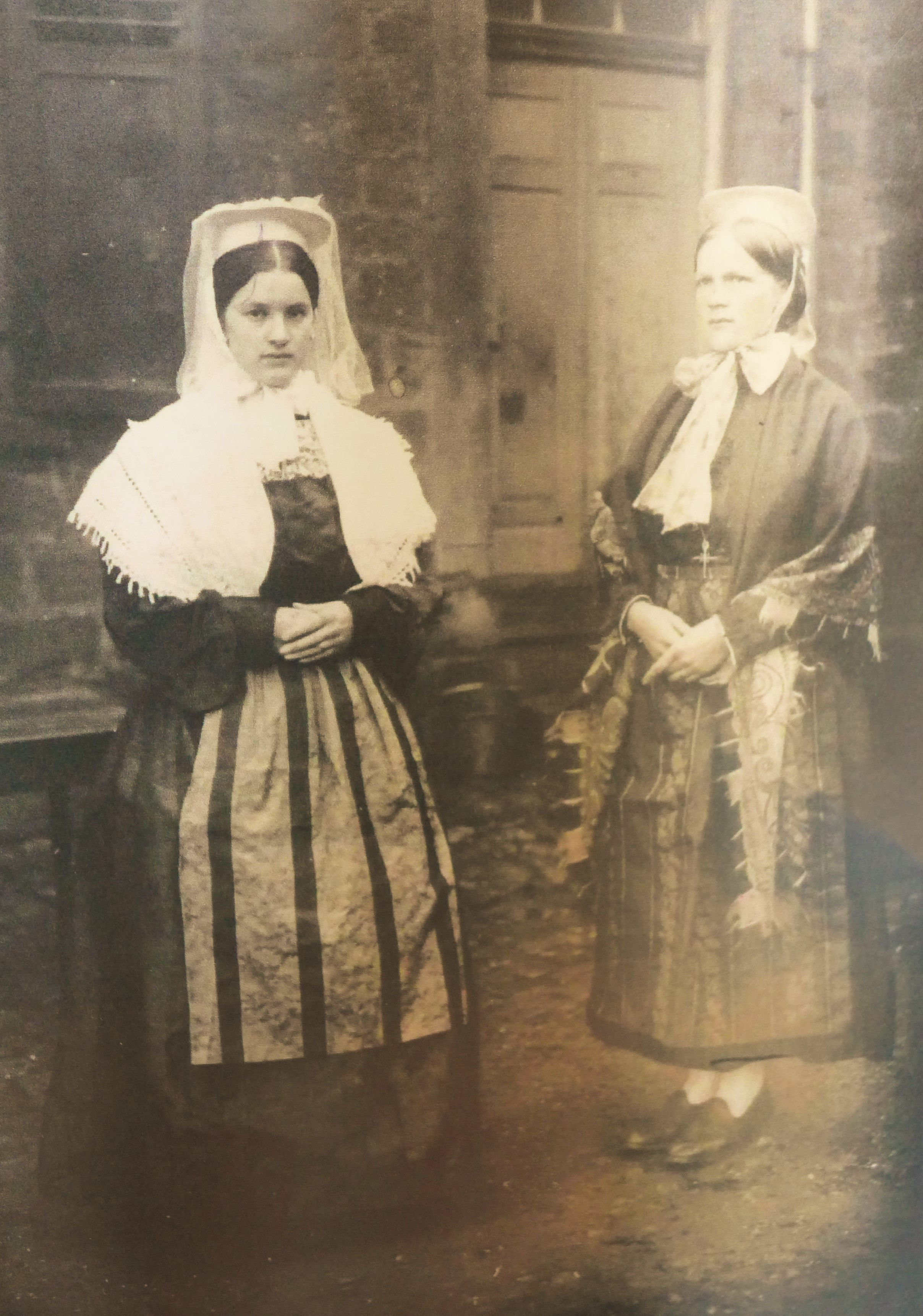 Brauttracht einer Frau vom Saargau aus der ersten Hälfte des 19. Jahrhunderts, Rekonstruktion (Stiftung Saarländischer Kulturbesitz)